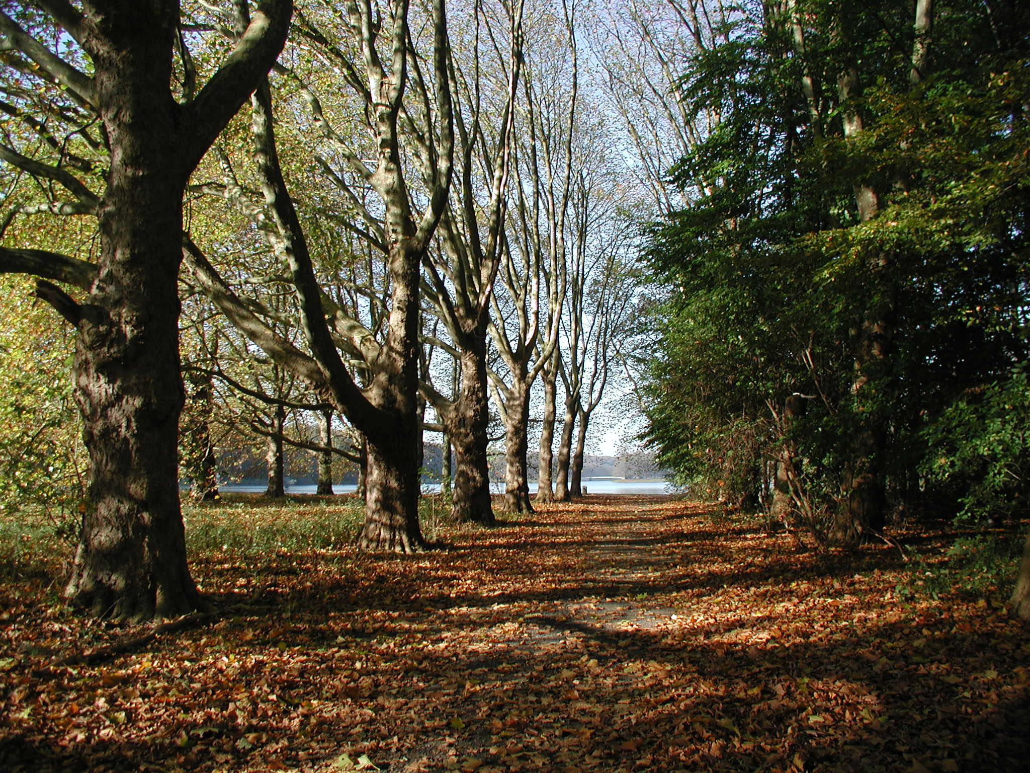 Koeln-Decksteiner-Weiher